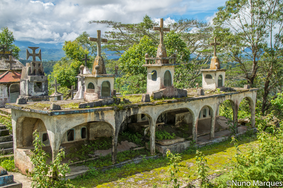 Unusual grave, Railaco, Timor-Leste